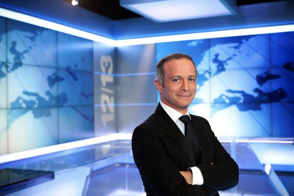 Le journaliste et animateur de télévision français Samuel Étienne sur le plateau de l'édition nationale du 12/13 sur France 3 en septembre 2011.